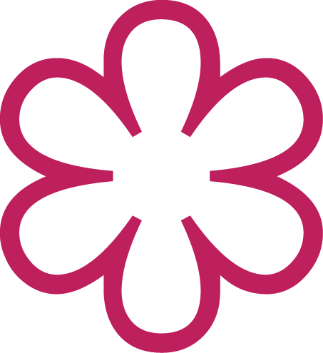 Stella Michelin Ristoranti